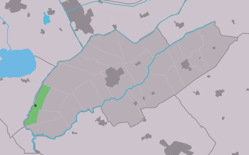 Kaartsje fan himrik fan De_Langelille